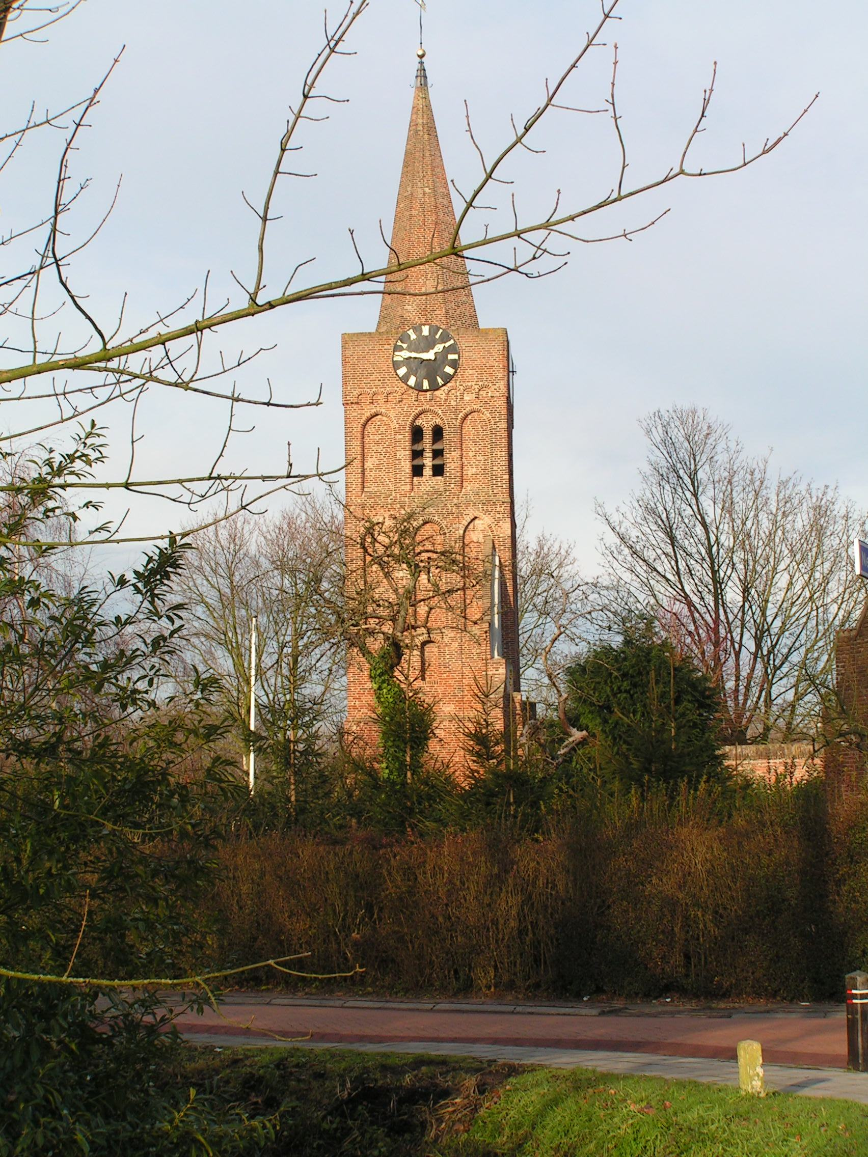 Romboutstoren te Andel